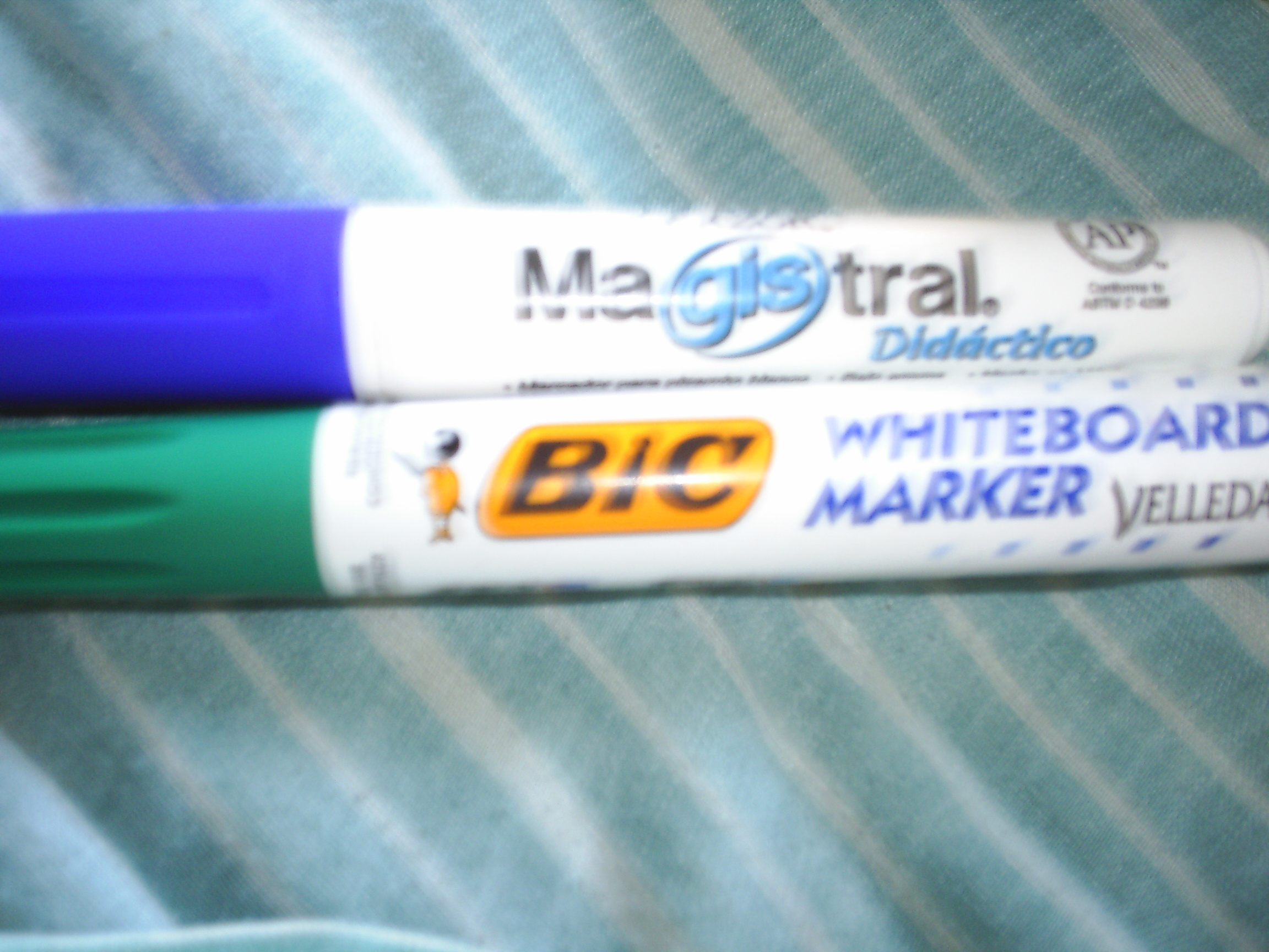 WHITEBOARD MARKERS. MARCADORES PARA PIZARRÓN BLANCO.